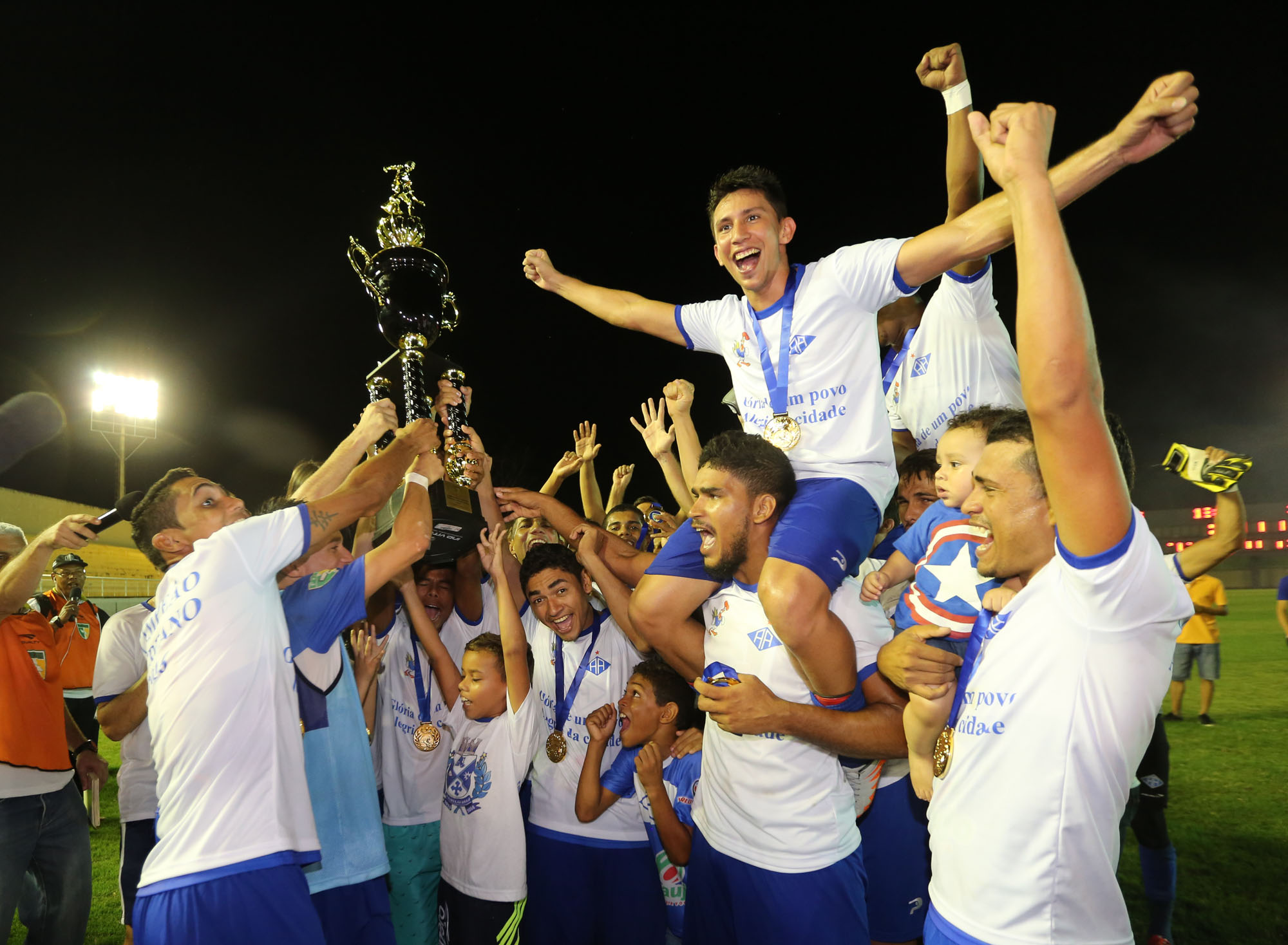 Foto: Sérgio Vale/Secom